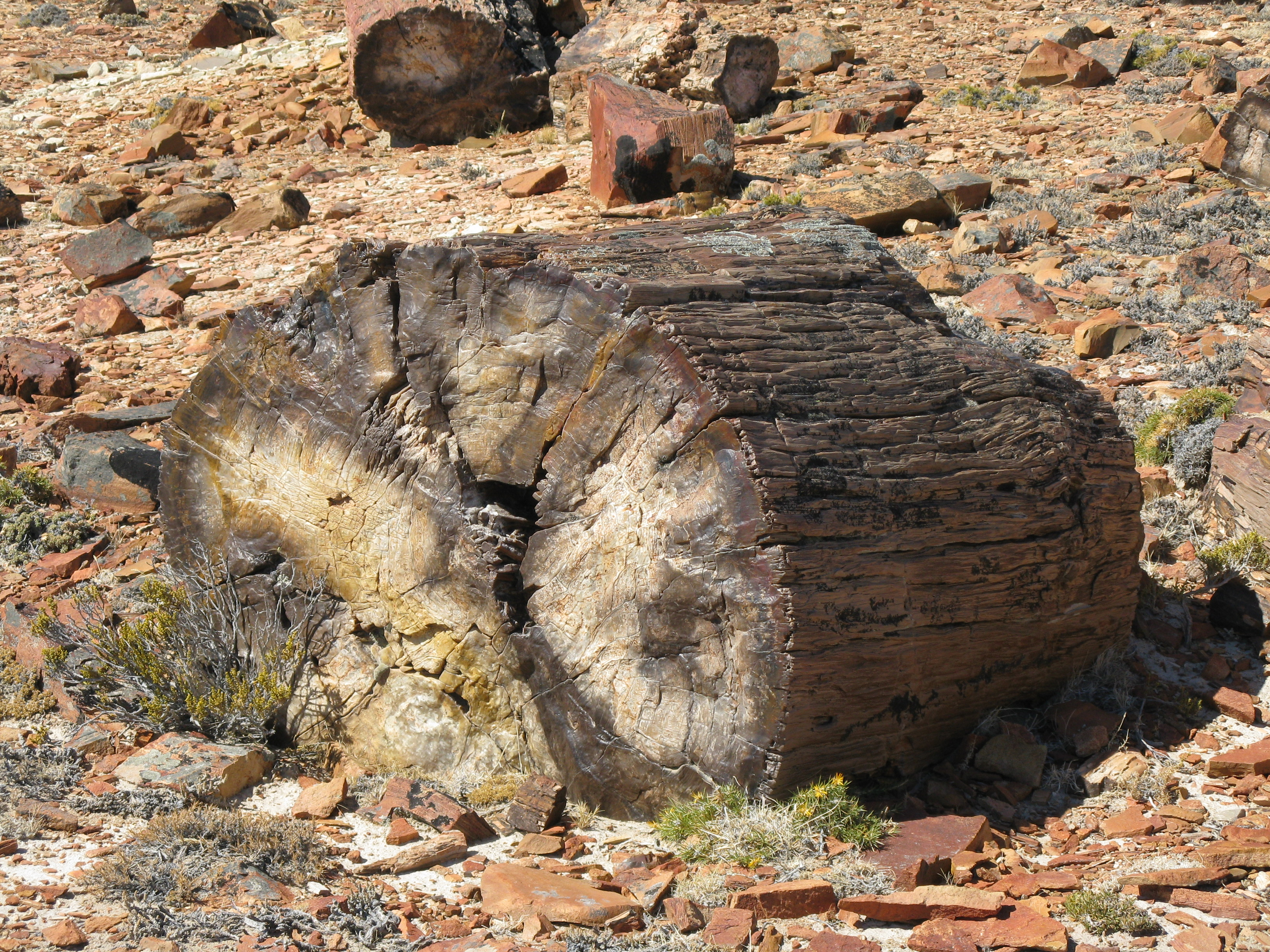 Tronco petrificado en Bosque Petrificado Jaramillo - Santa Cruz - Argentina